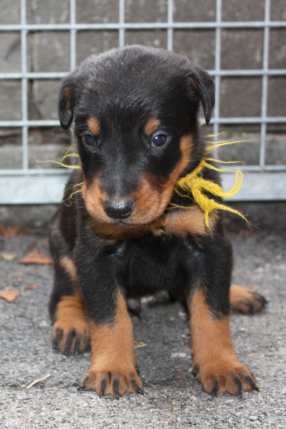 Bauceron de 3 semaines